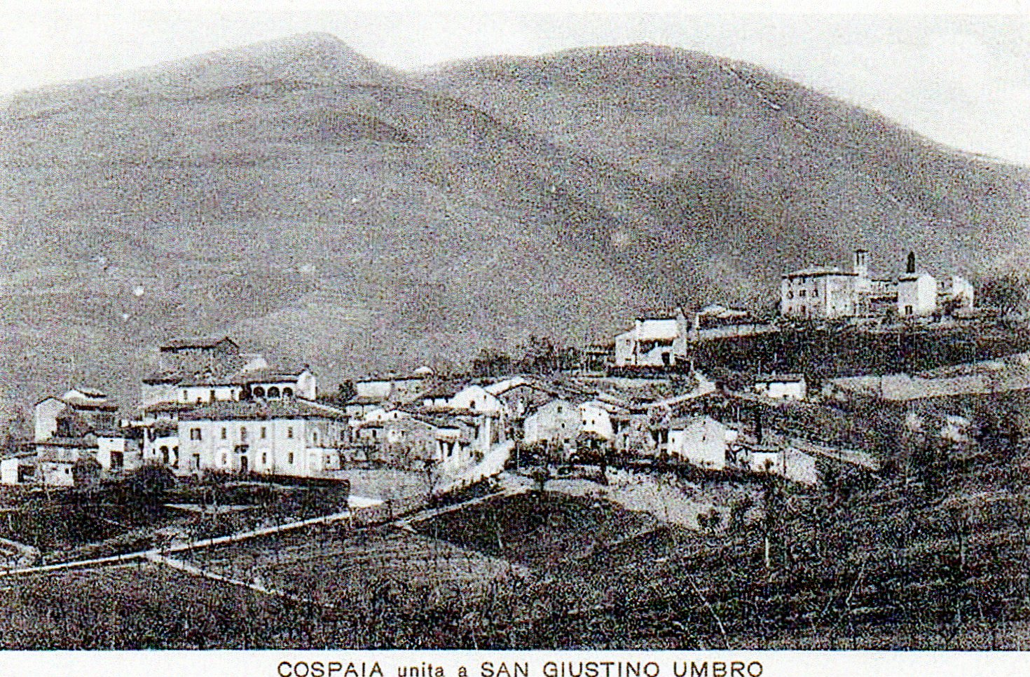 panorama dell'antica repubblica di Cospaia (San Giustino Umbro)